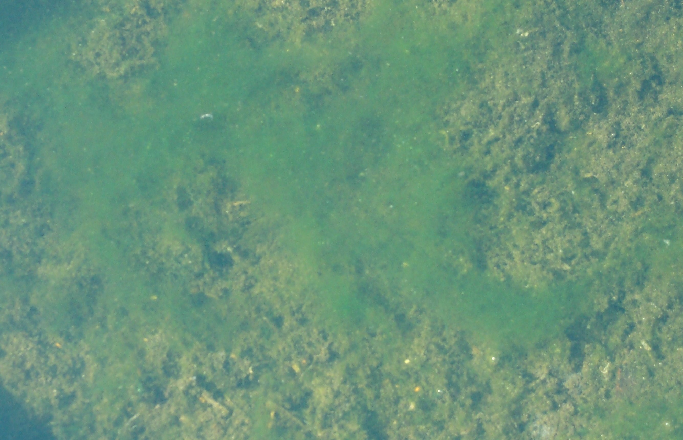 Nitki skrętnicy Spirogyra.sp